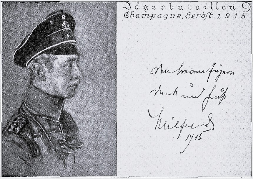 Beipackkarte zu den Liebesgaben der Armee des Kronprinzen